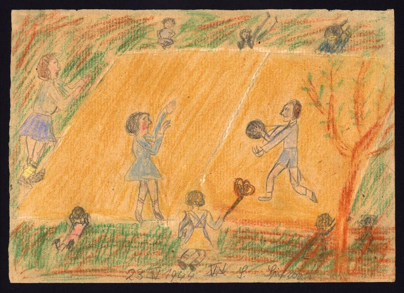 Sonja Spitzová: Dětské hry